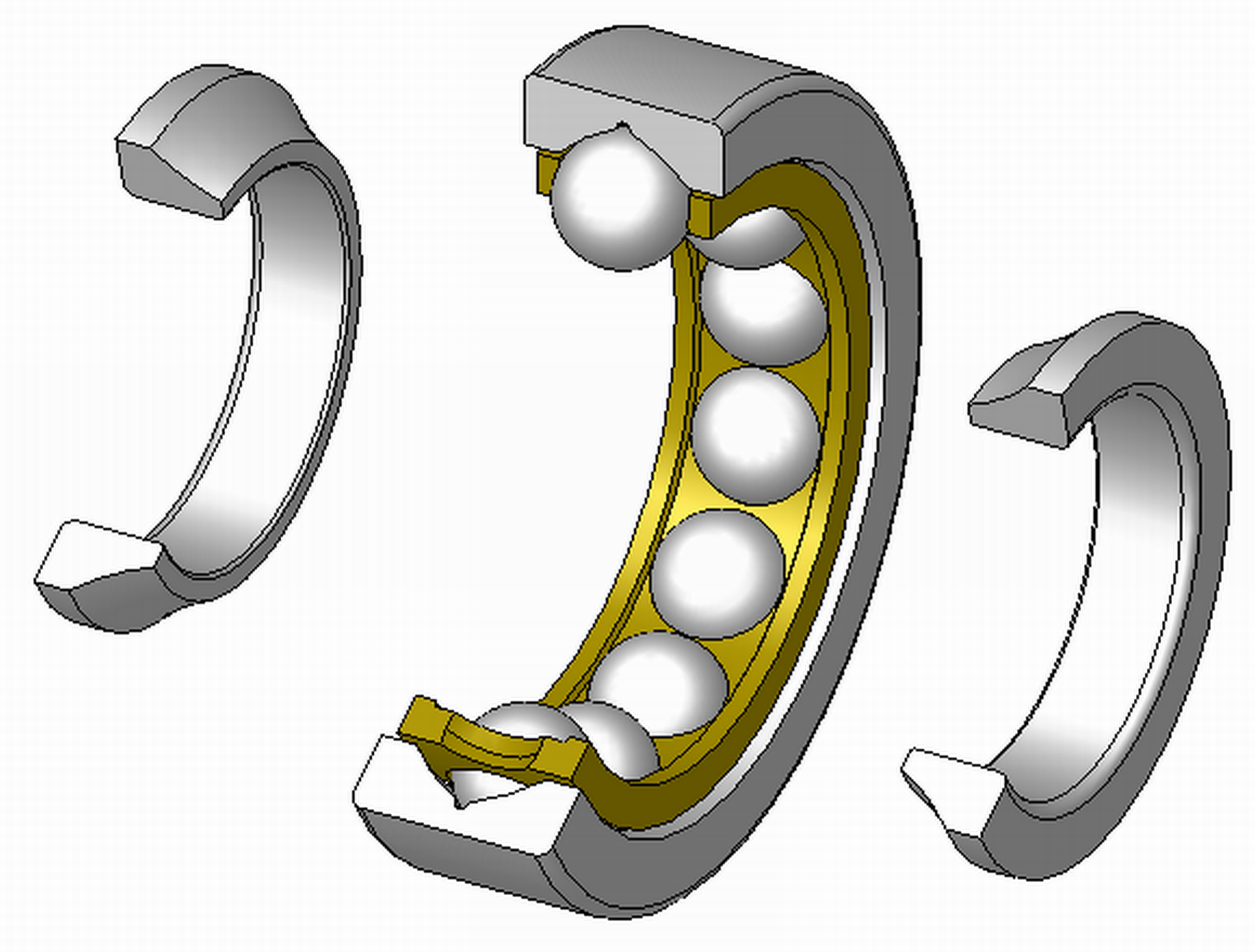 Vierpunktlager, geteilter Innenring, zerlegbar, Massivkäfig aus Messing, Explosionsdarstellung, 120°Schnitt, Hinweis: Innenaufbau des Lagers (insbesondere des Kaefigs) variiert je nach Hersteller und Baugroesse rolling contact bearings